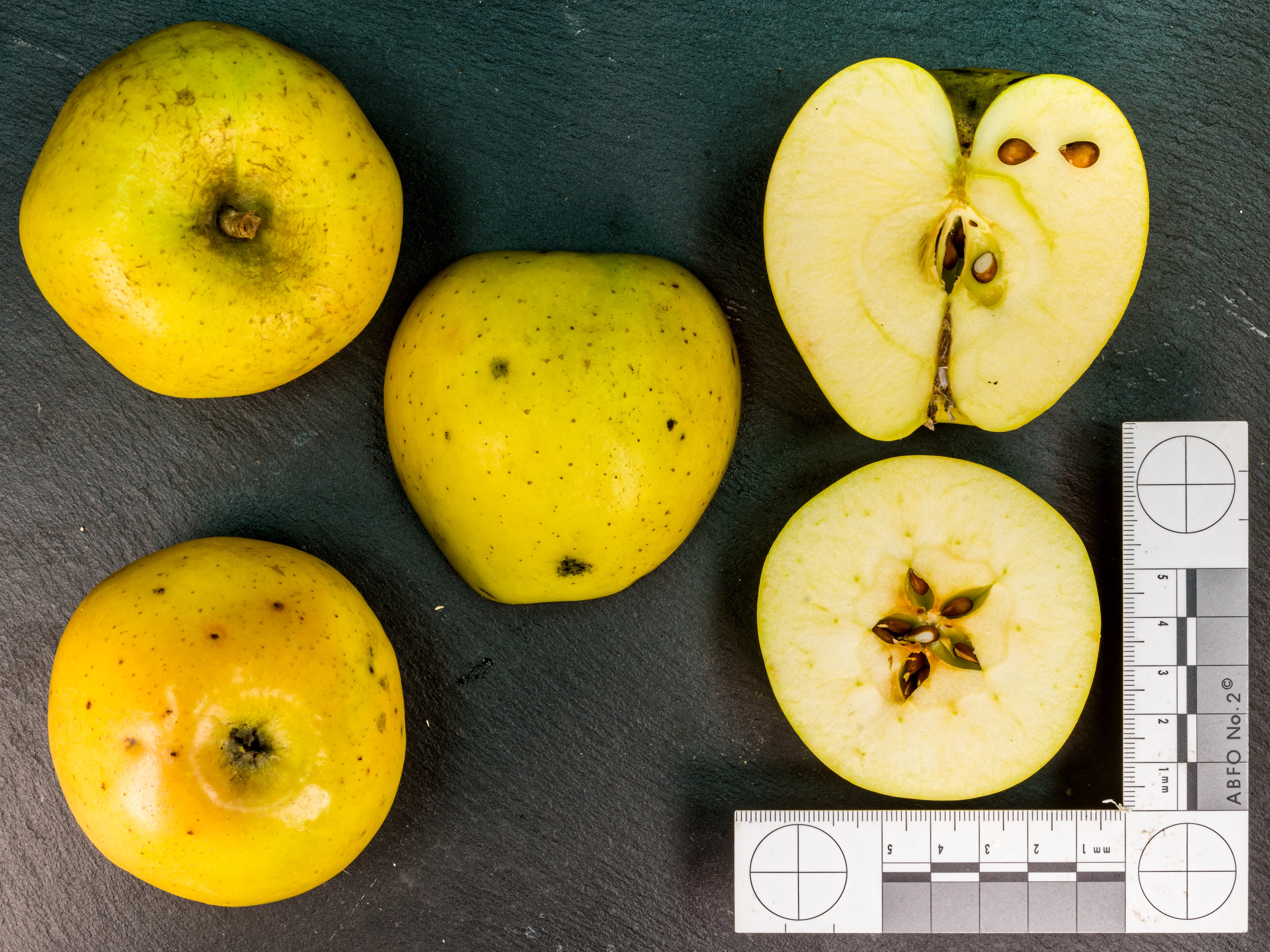 Apfelsorte: GoldRush, auch Goldrush, Goldrausch oder Coop 38